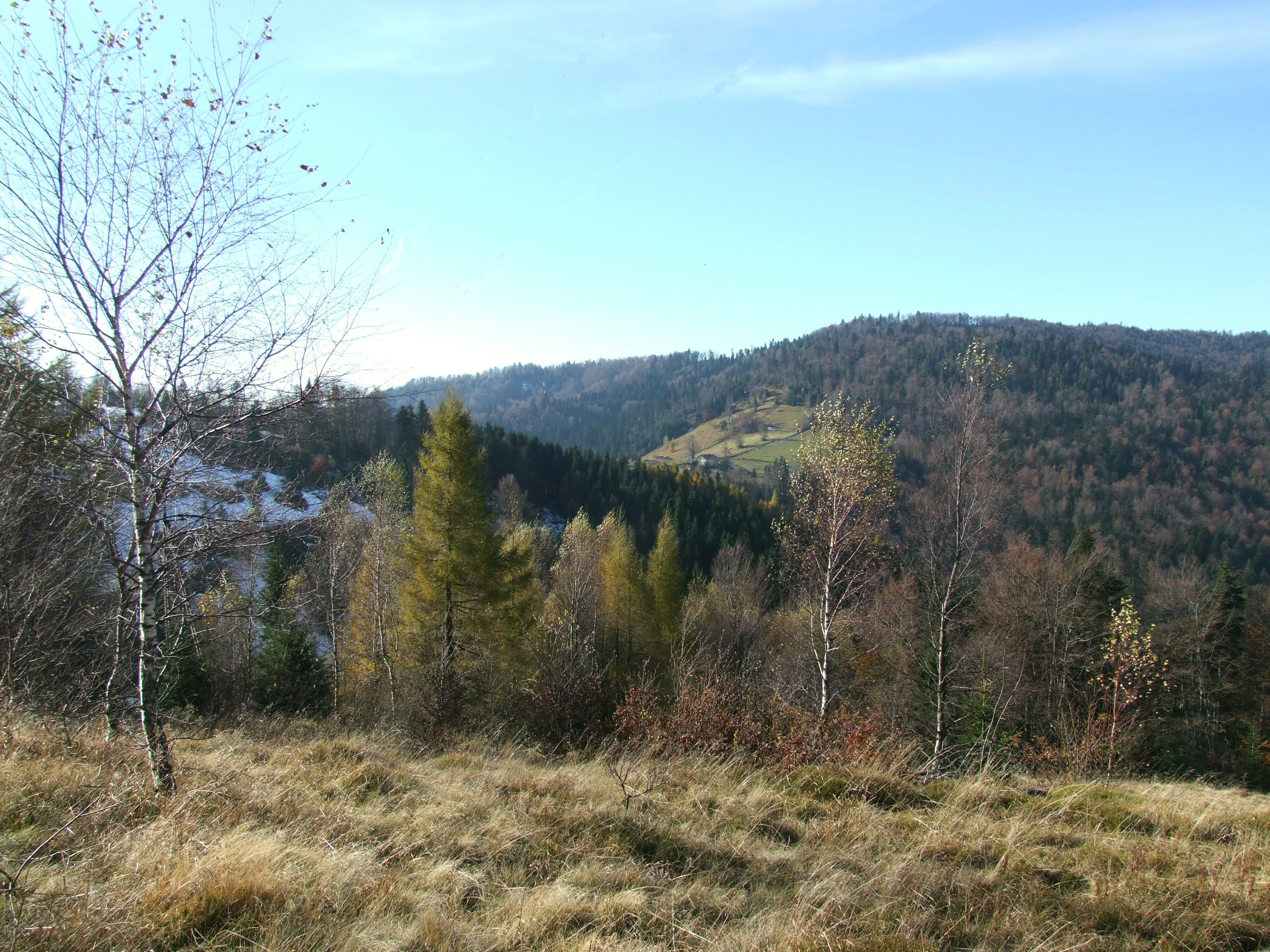 Przełęcz i polana Przysłop w Beskidzie Sądeckim. Widok ze stoków Kuby. Po prawej stronie Przysłopu Dzwonkówka